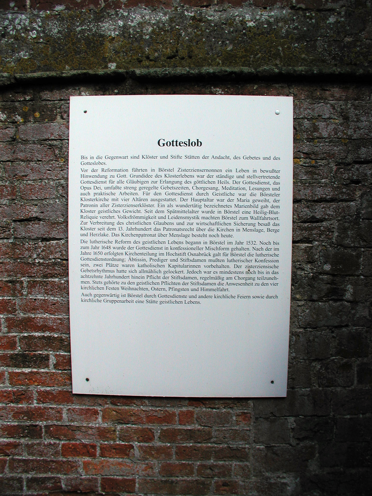 Stift Börstel, Börstel-Berge